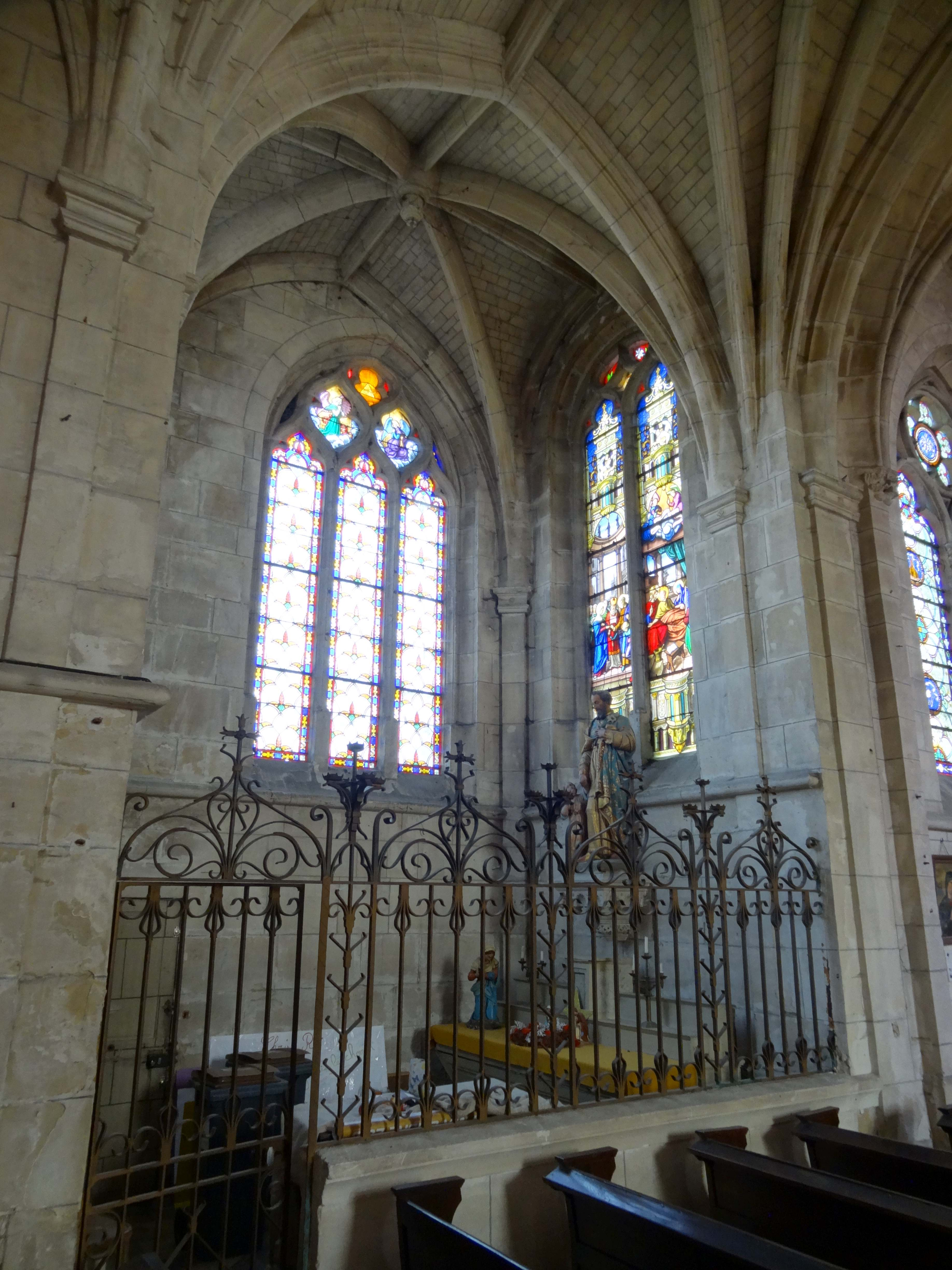 Intérieur de l'église - voir titre.